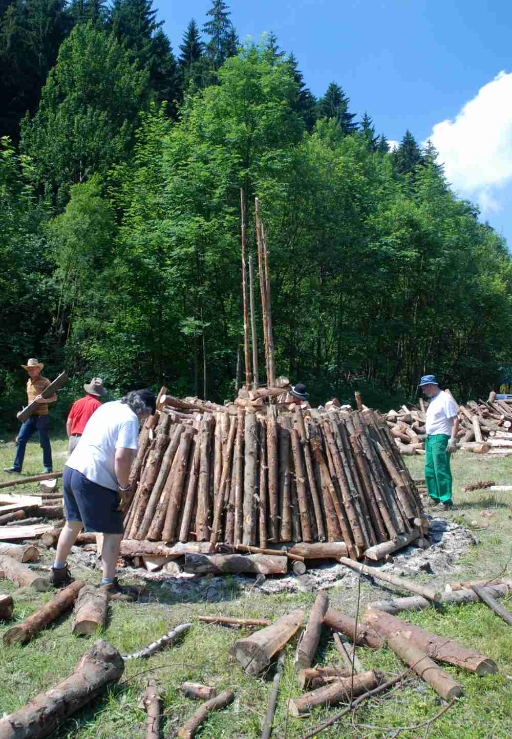 Stavba milíře, spodní patro